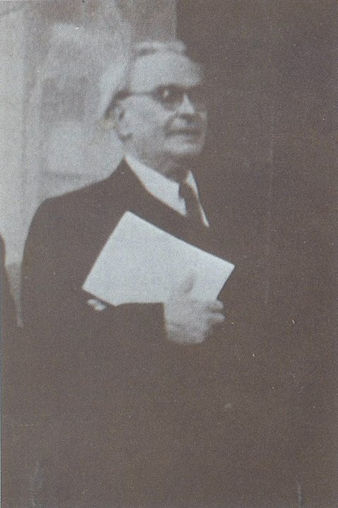 Hermión Larios Torres. El maestro